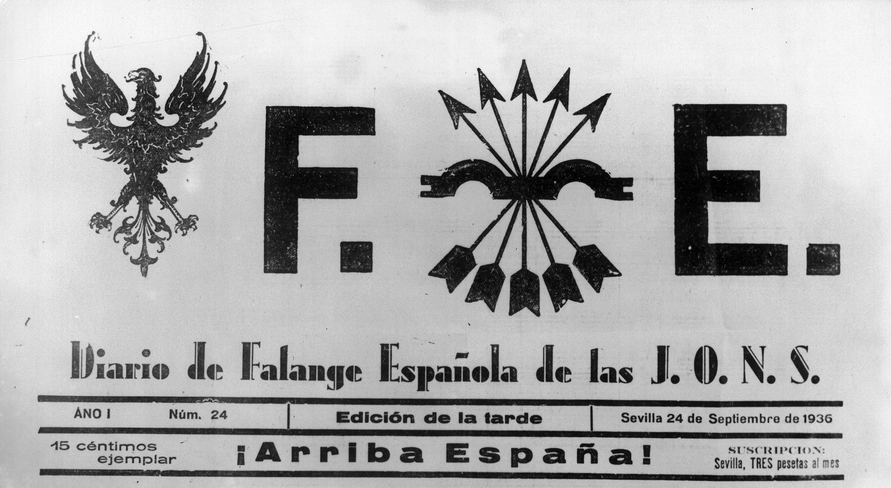 Cabecera del diario F.E de Sevilla, en su edición del 24 de septiembre de 1936.